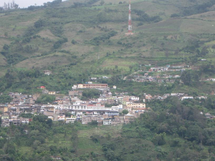 Alban-Nariño